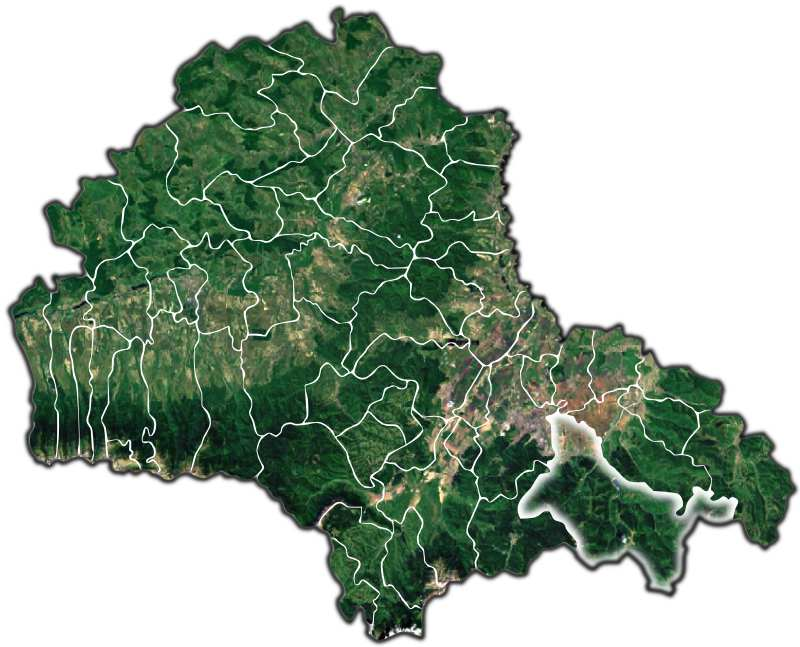 Sacele jud Brasov.